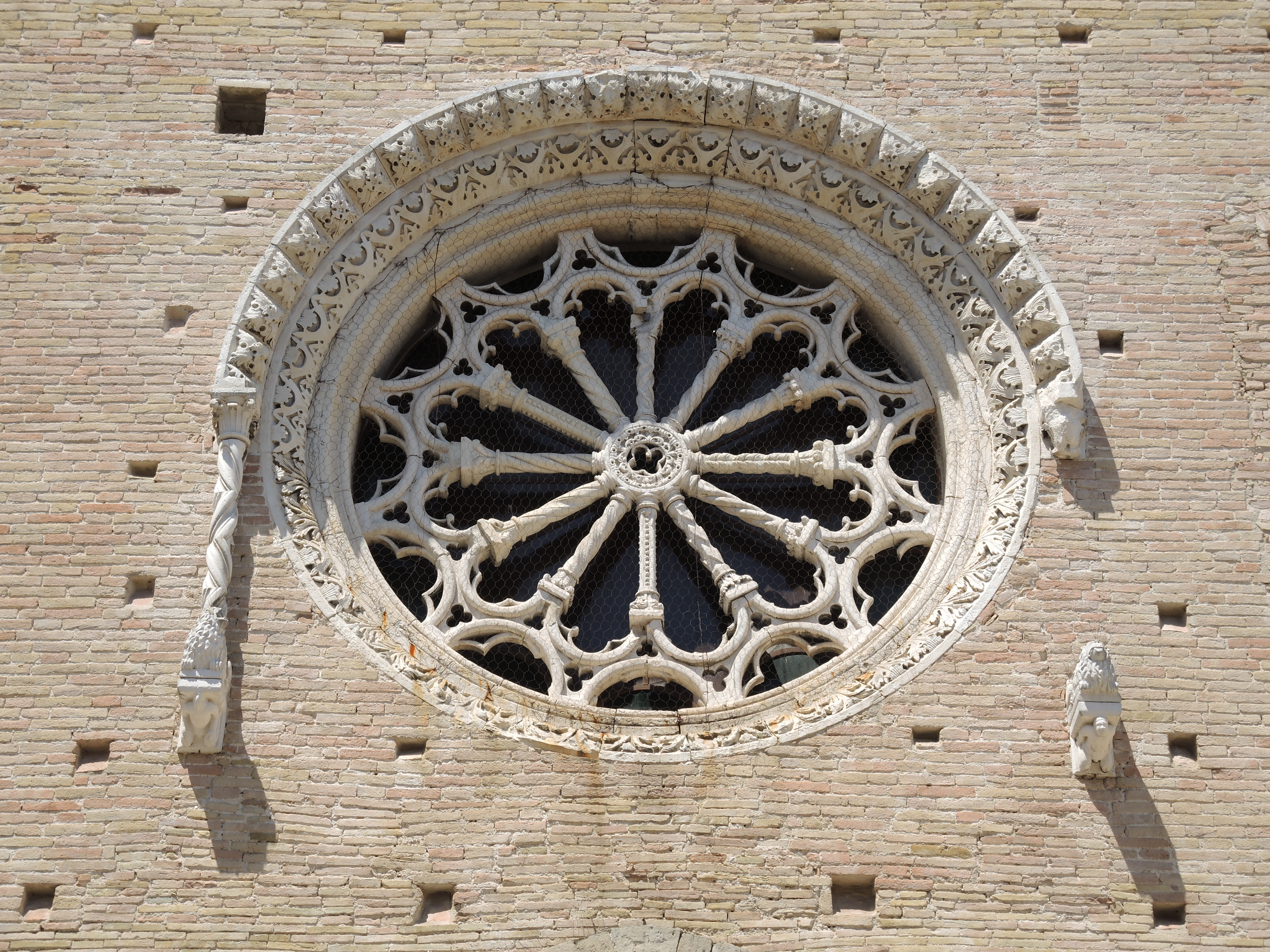 Lanciano - Chiesa di Santa Lucia